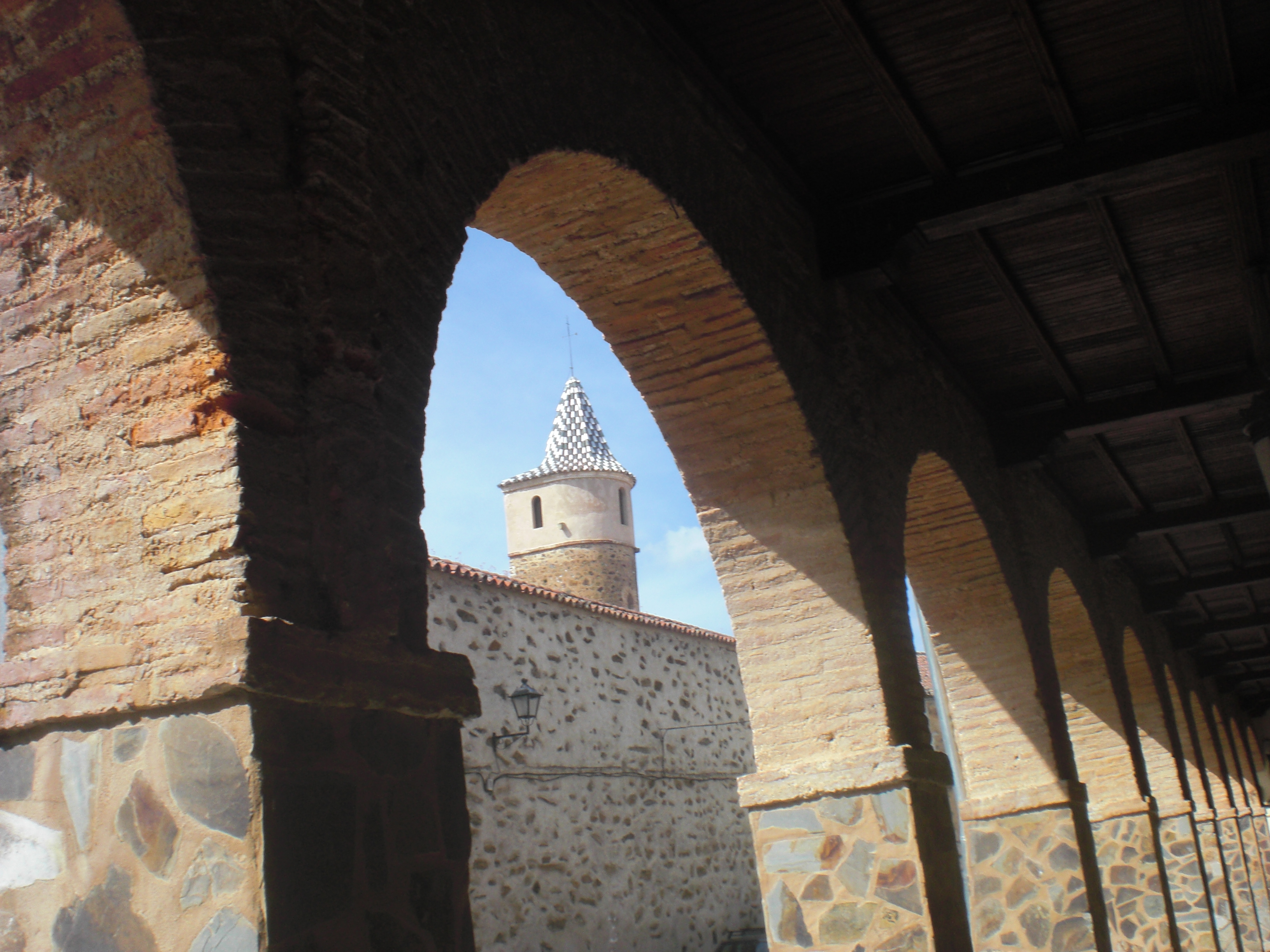 portikaro de guadalupe